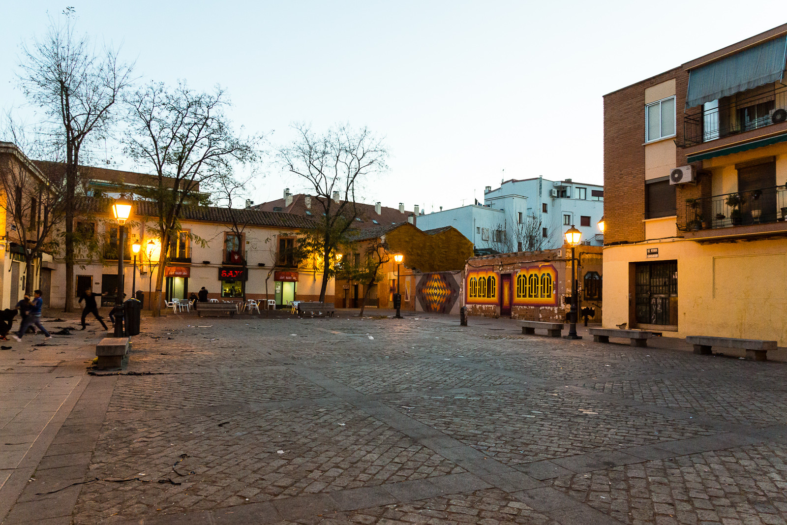 Murales de invierno - I - 83